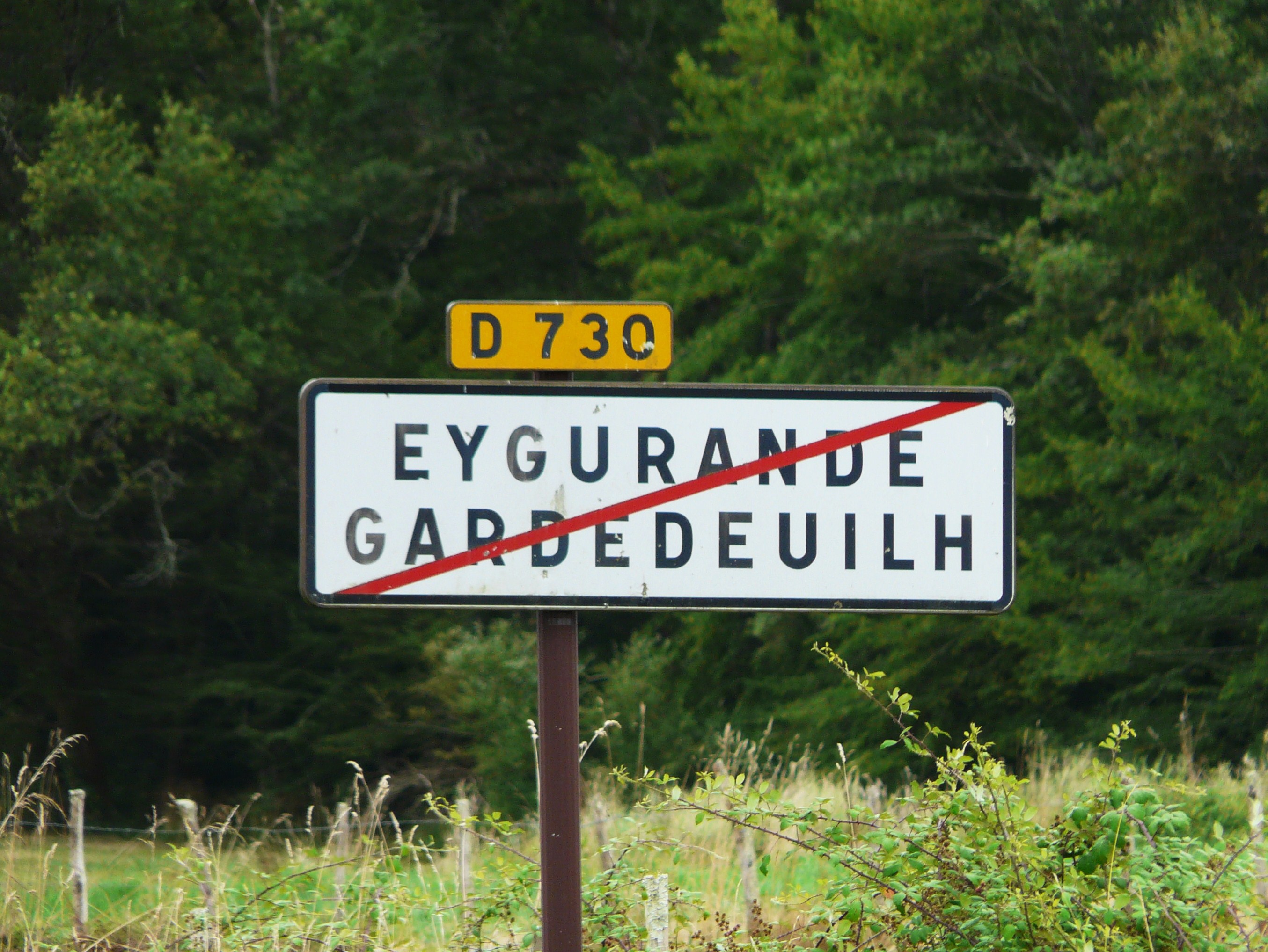 Sur la route départementale 730, panneau de sortie d'Eygurande-et-Gardedeuil, Dordogne, France.